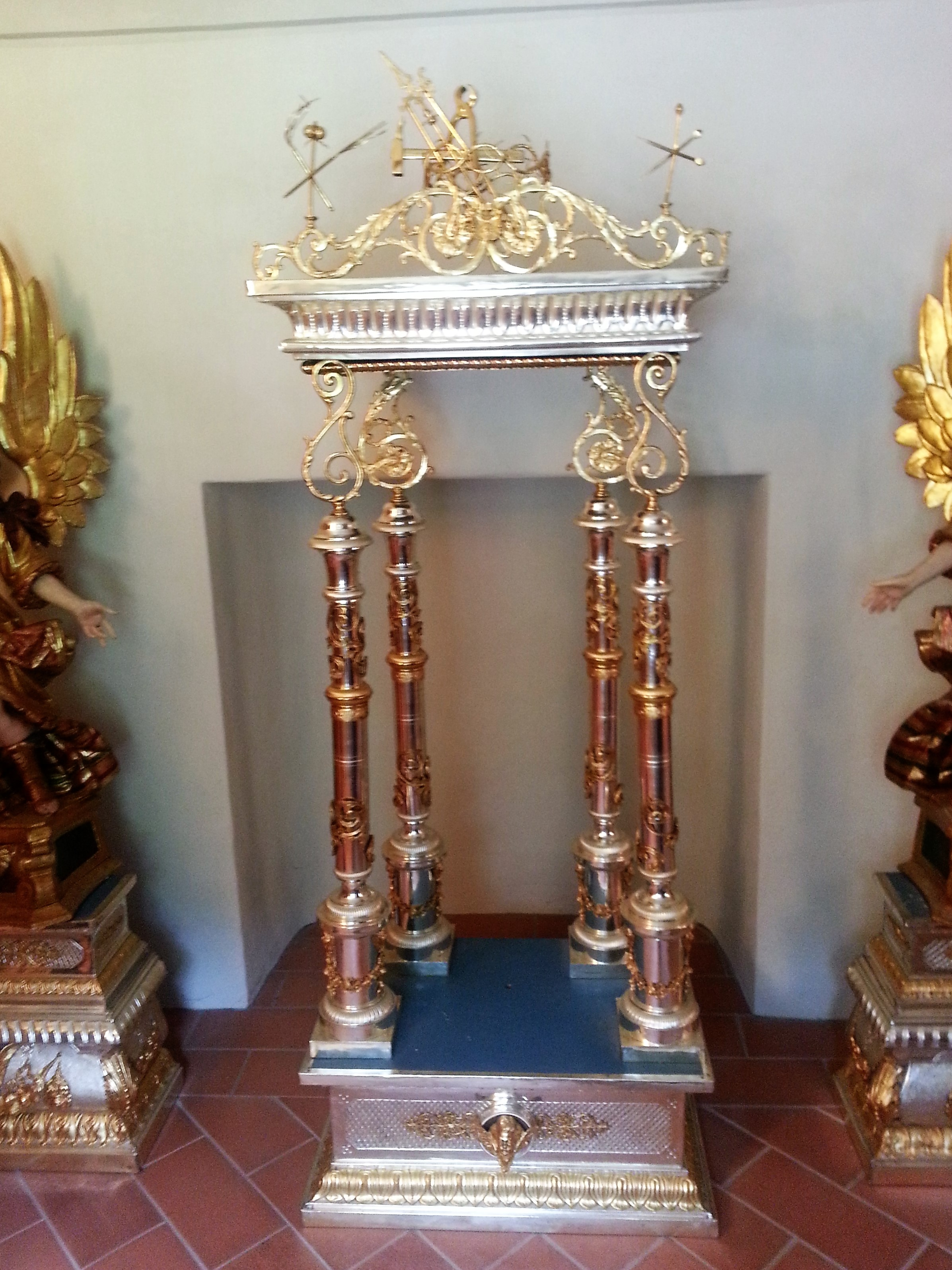 Altare usato per l'esposizione della santa Croce